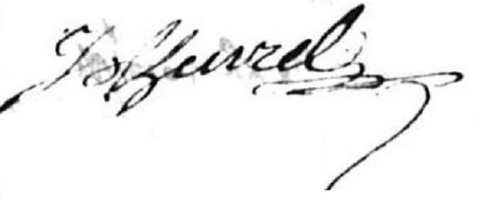 Signature de Jean Theurel au mariage de 1750